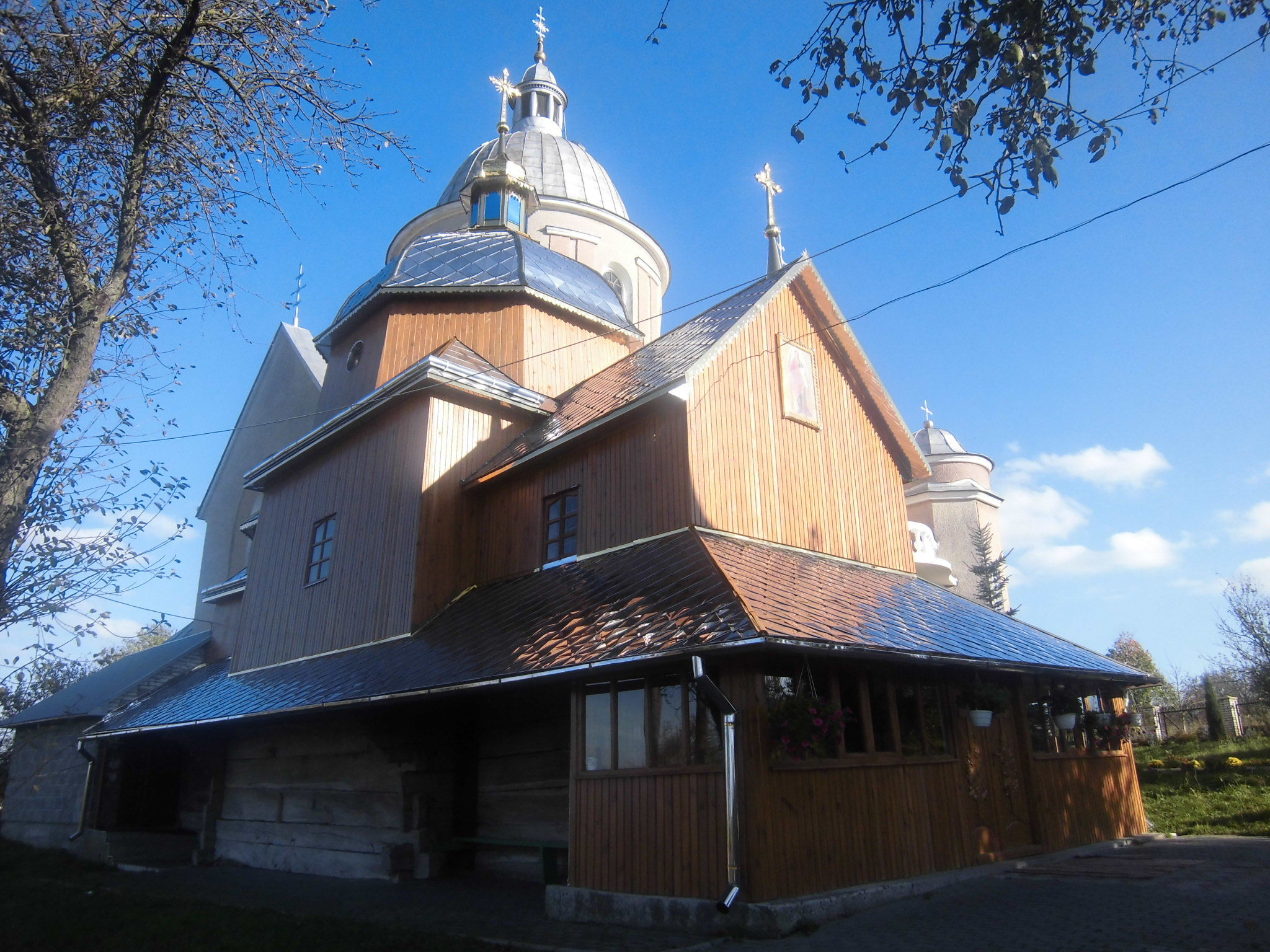 Церква св. архістратига Михаїла с. Мужиловичі